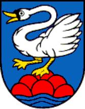 Wappen der politischen Gemeinde Liesberg, Schweiz